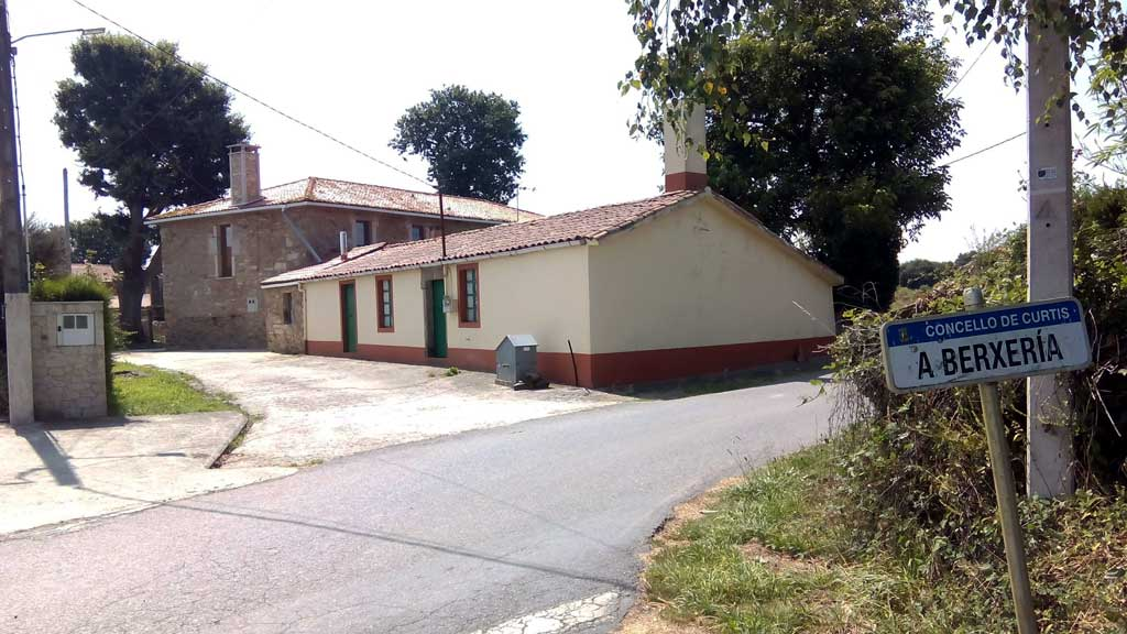 Vista da Berxería, Curtis.